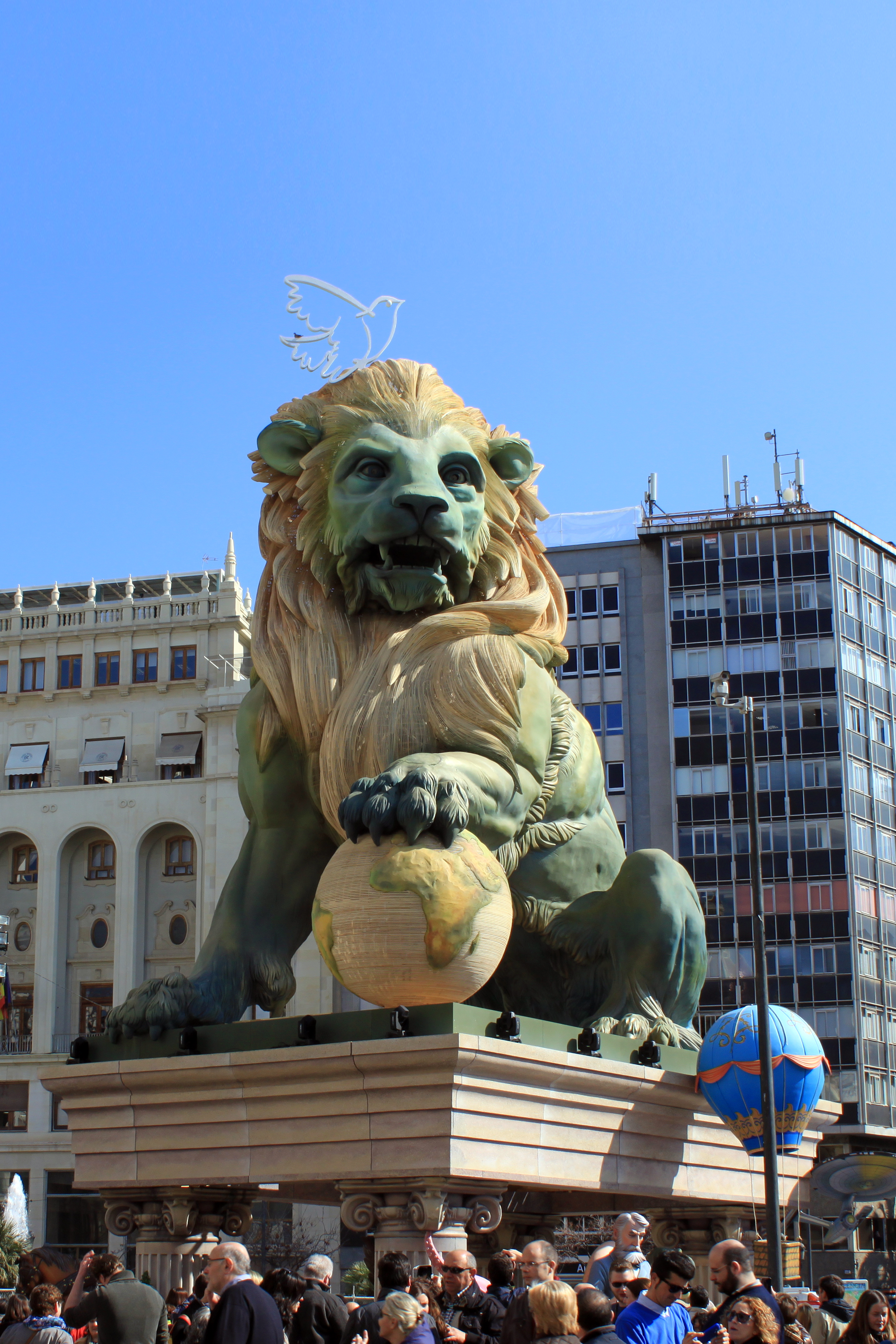 Falla de la Plaza del Ayuntamiento de Valencia de 2015.